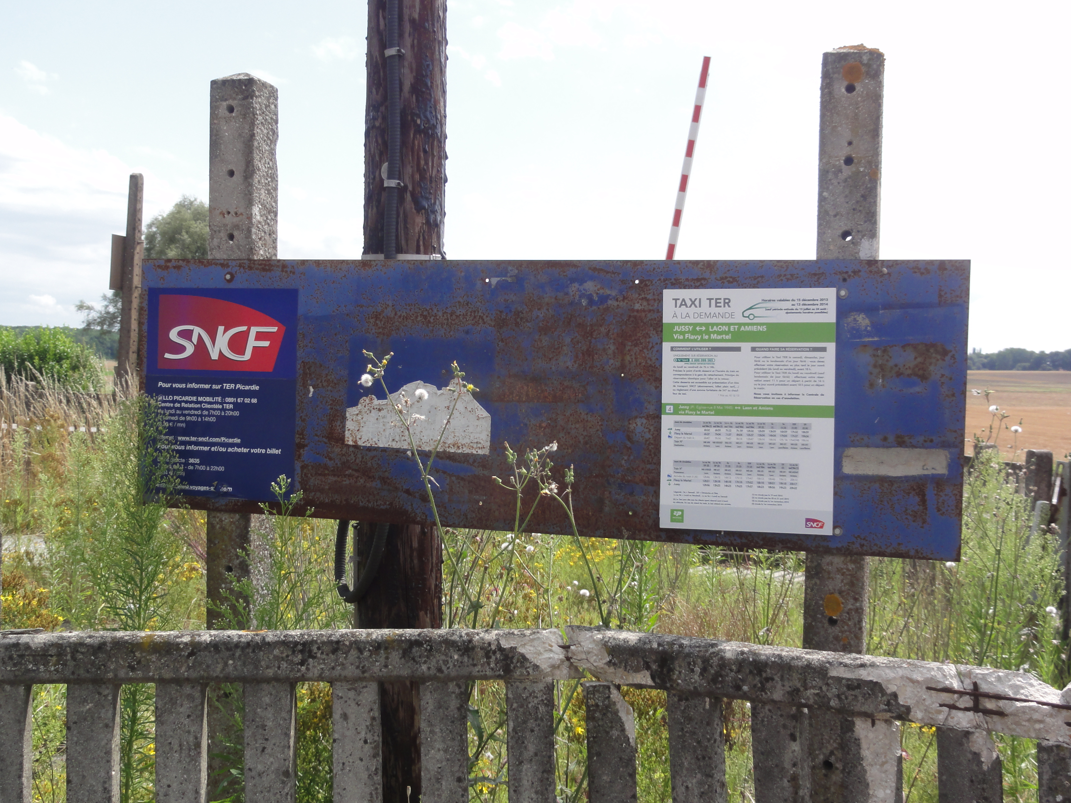 Jussy (Aisne) ancienne gare, panneau Taxi TER à la demande